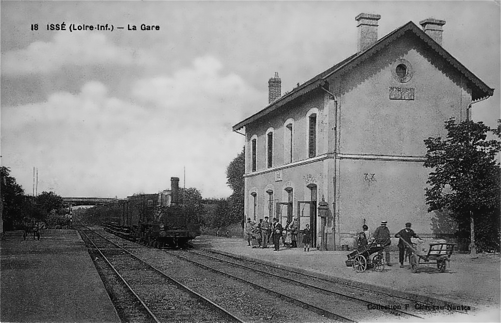 La gare d'Issé en Loire inférieure, les quais et la voie avec un train à vapeur devant le bâtiment voyageurs.